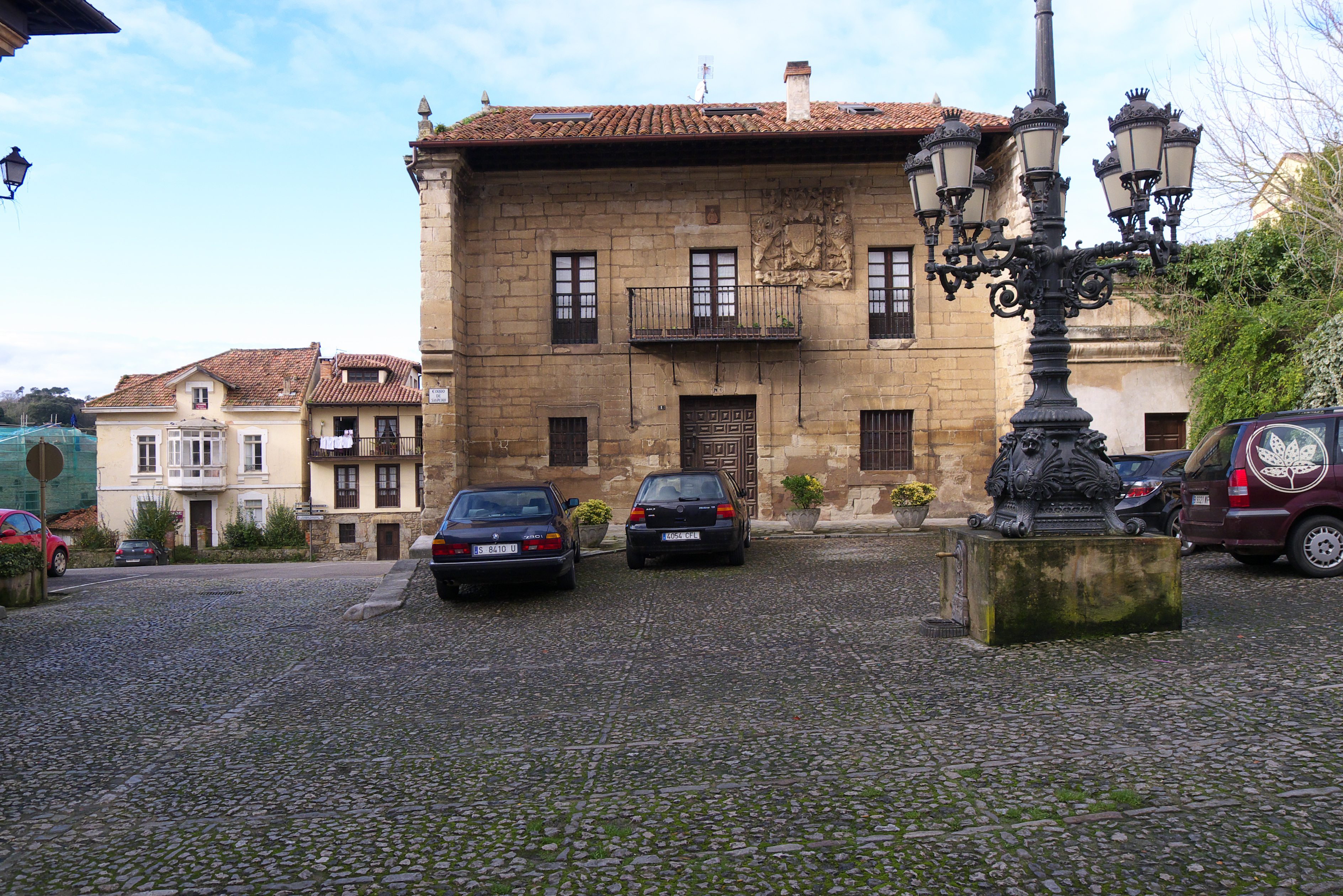 Un lugar comillano de esparcimiento. La casona de 1724, presenta el escudo de los Sánchez de Cueto.